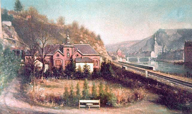 Tableau de la maison de François Sodar, peinte par lui en mars 1880. Sur la droite, on remarque le chemin de fer et la Meuse; dans le fond, la citadelle et l'église collégiale avec son bulbe caractéristique. Sur le cadre (en bas au centre), se trouve une petite plaquette de cuivre sur laquelle est gravé: « FRANZ SODAR ». Ce tableau a été acquis, en 1970, par Madame Victoria Sodar (descendante d'une branche collatérale espagnole) de Madame Victor Henry de Frahan, de Leffe-Dinant, grâce à la médiation de Monsieur Georges Pire (†). Fichier scanné par Bruno Van Eeckhout, tiré d'une photographie de l'original, provenant du patrimoine de la famille Van Eeckhout.